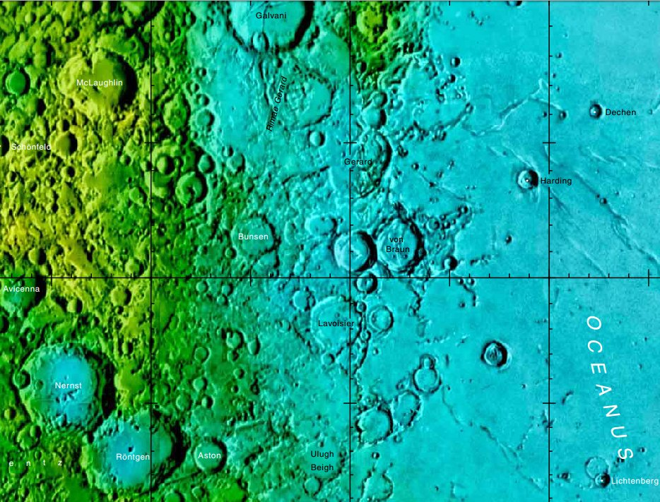 Cráter lunar Gerard. Localización. (Imagen LRO)